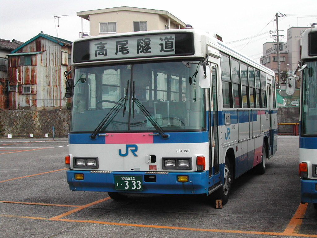 紀伊田辺自動車営業所にて、許可を得て撮影